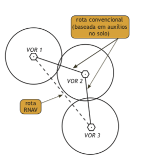 comparação entre rota convencional e rota RNAV